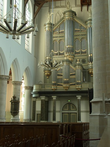 Delft - Església vella - Orgue